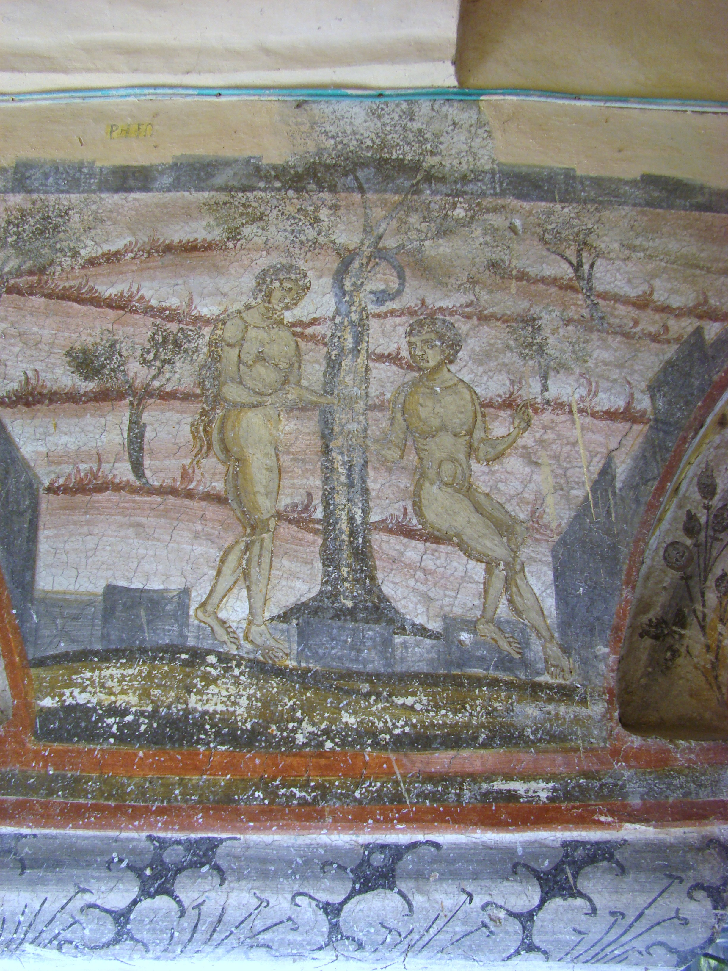 Biserica „Toți Sfinții” din Călugăreasa, județul Gorj